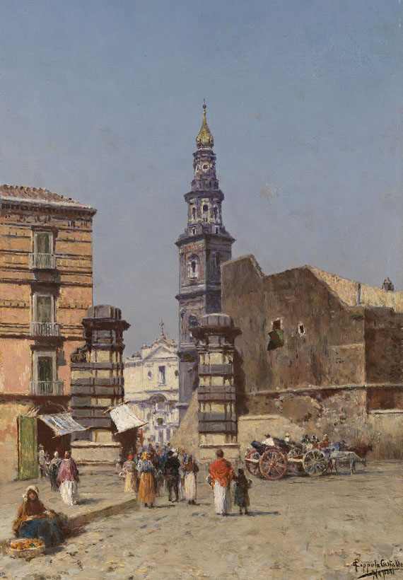 Napoli. 40,5 x 28 cm